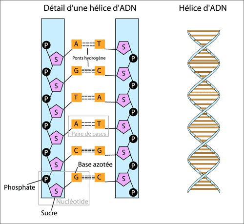 La structure moléculaire d'ADN.